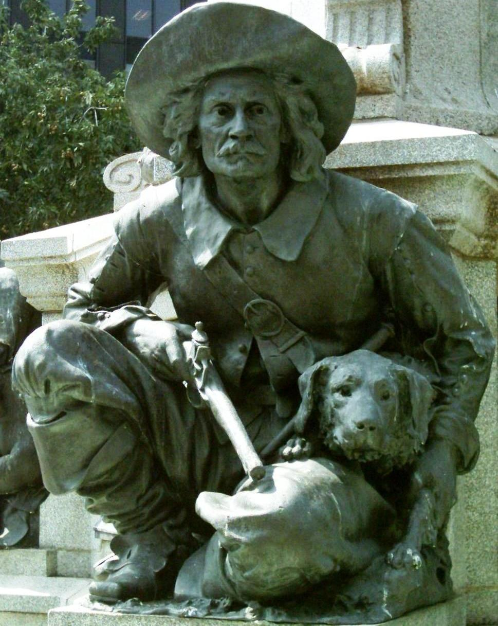 Bronze représentant Lambert Closse. Il est l'une des 4 figures accompagnant le momument à Maisonneuve situé au centre de la Place d'armes à Montréal.